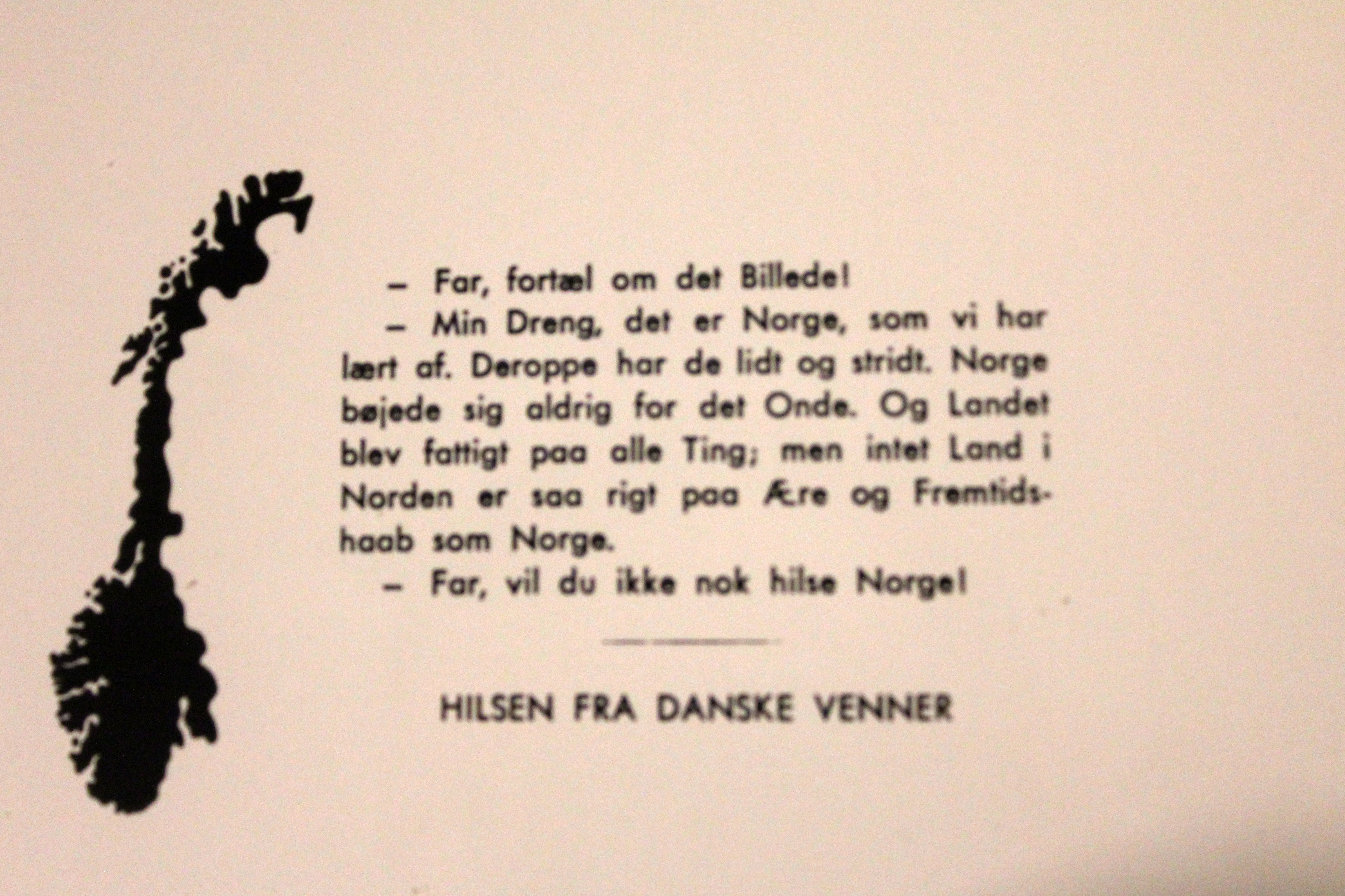 Kort fra Norgeshjælten